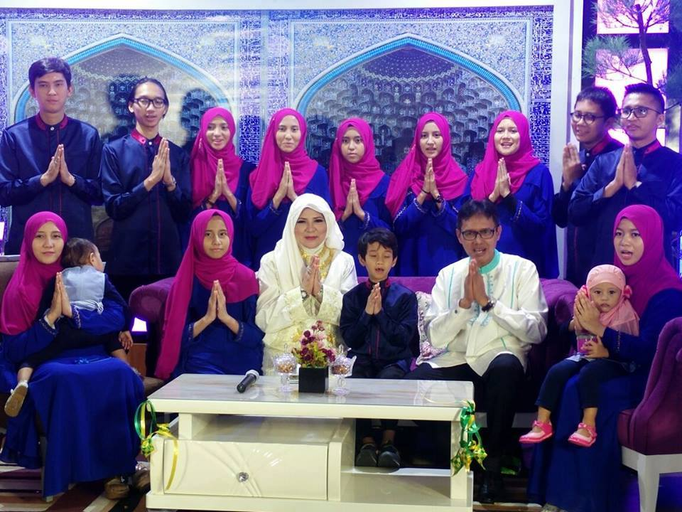 Keluarga Irwan Prayitno